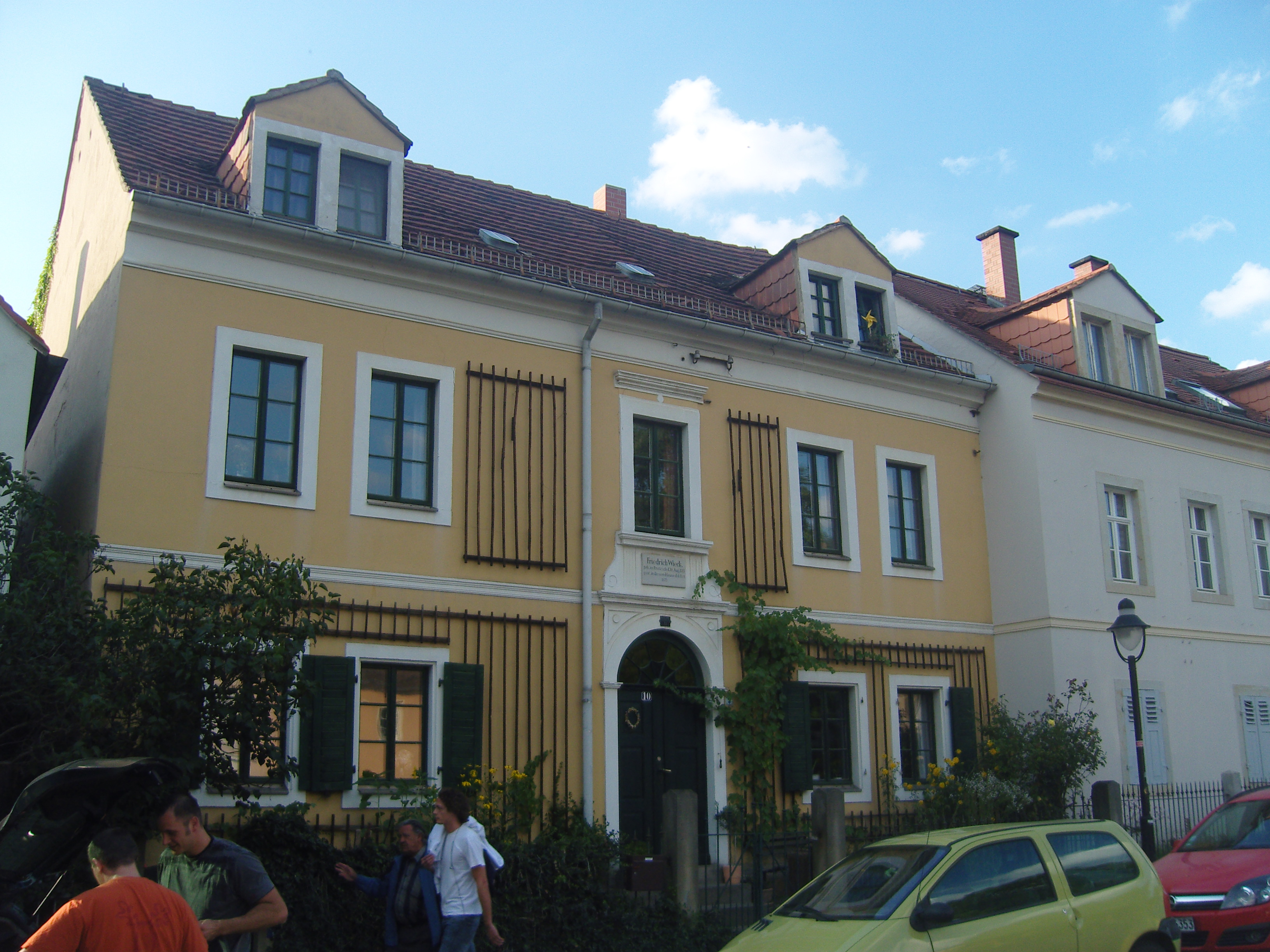 Denkmalgeschütztes Wieck-Haus, Wohnhaus mit Einfriedung (Friedrich-Wieck-Straße 10) in Dresden